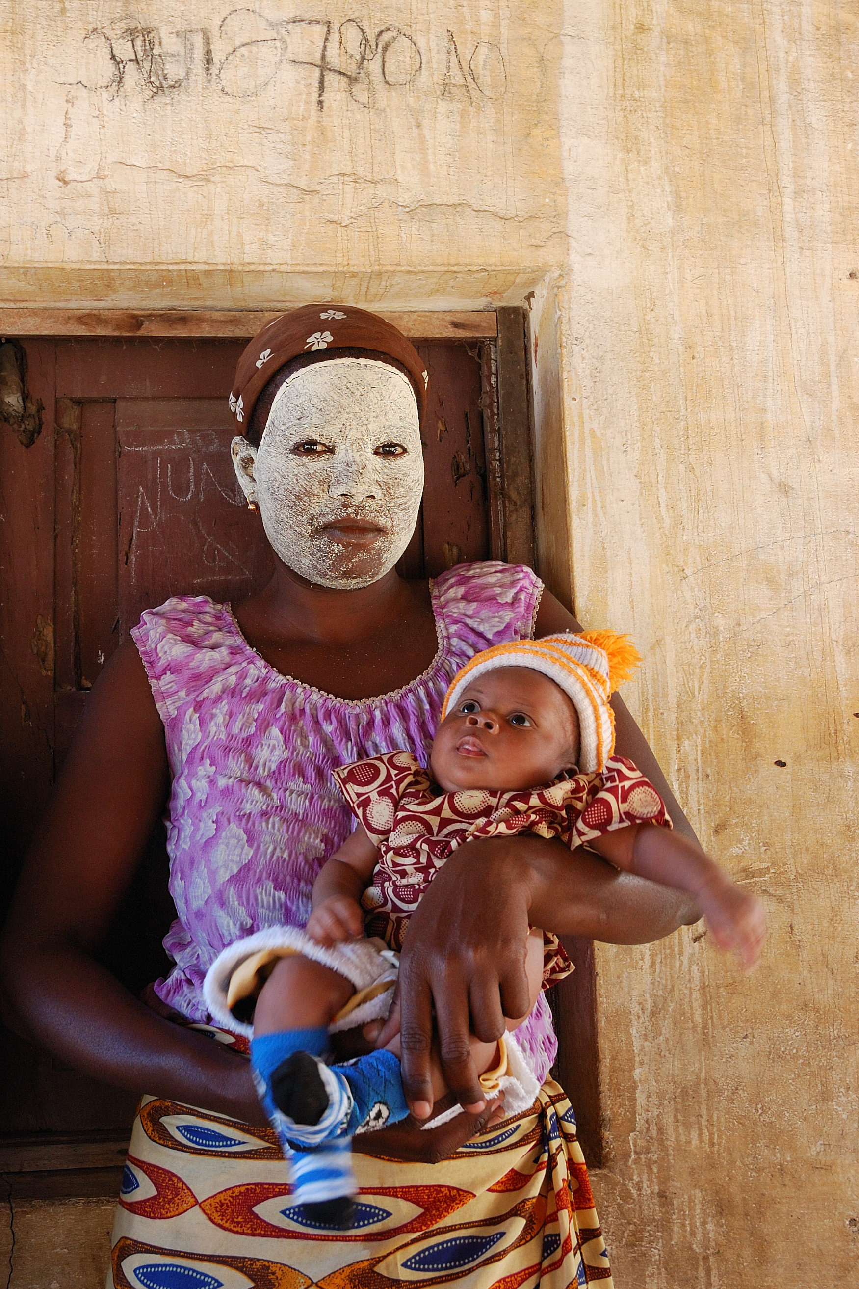 Ilha do Ibo, Moçambique [2009]